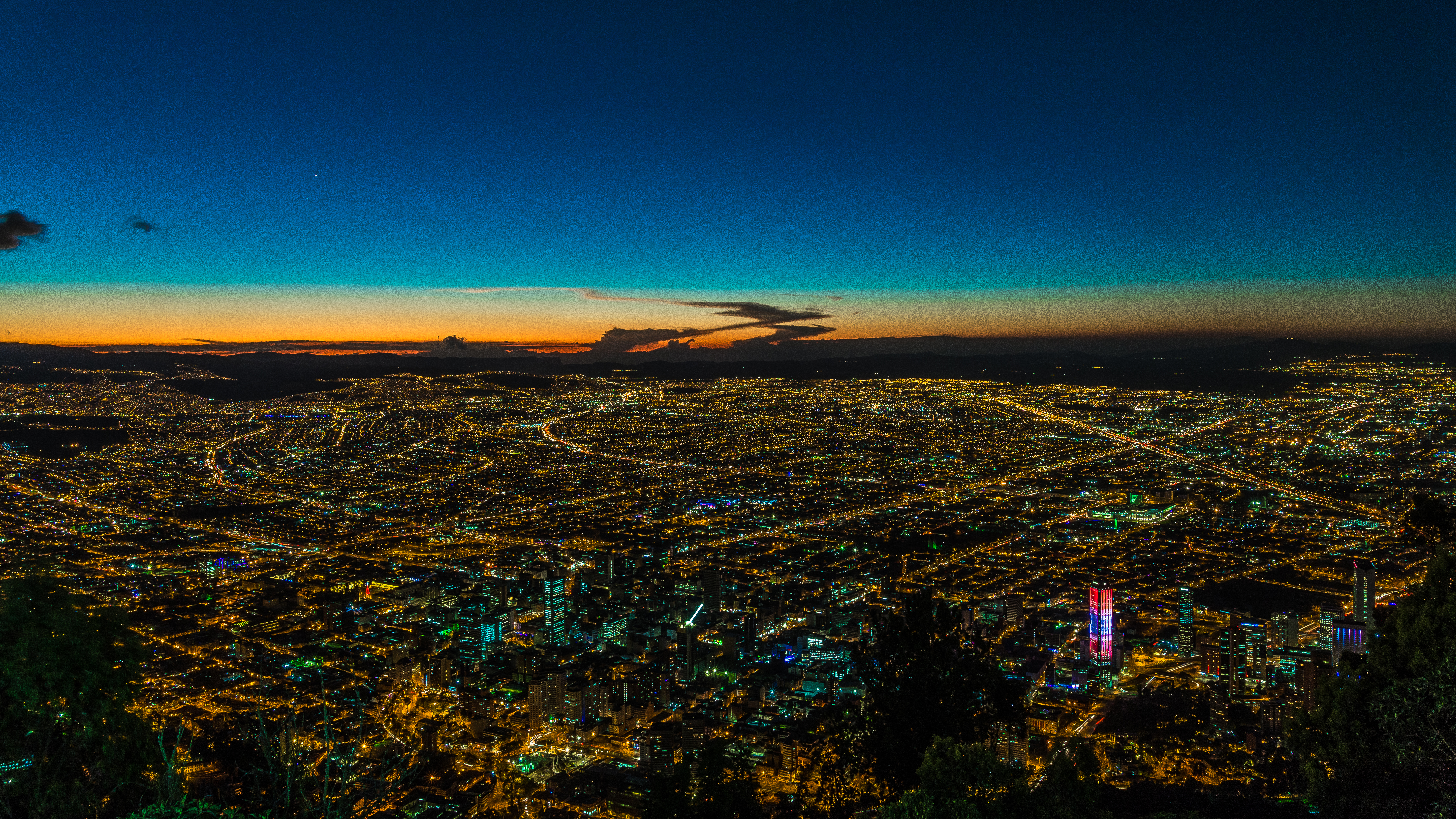 Bogotá, Colombia - Nocturna